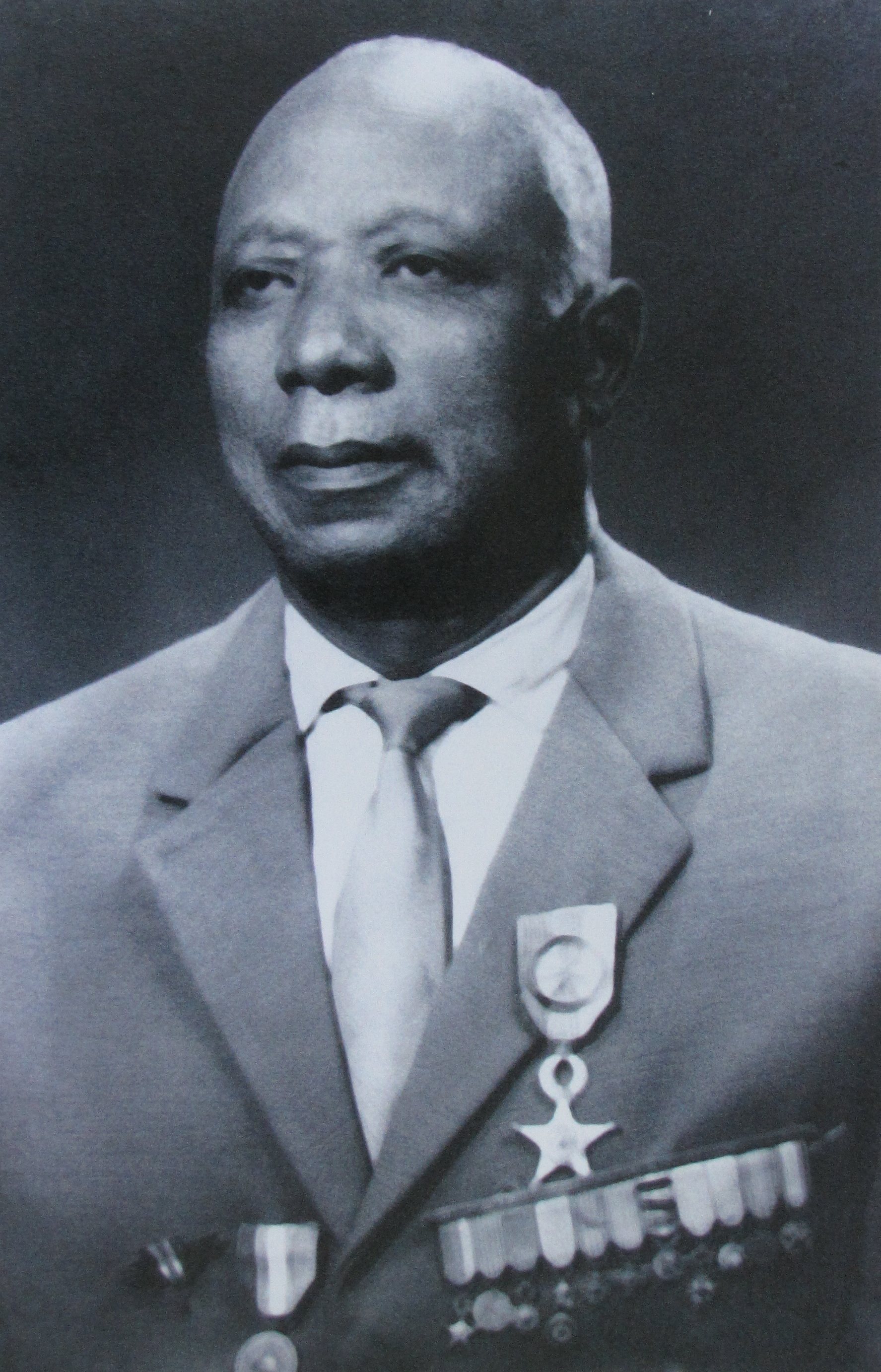 Photo de Raphaël Onana